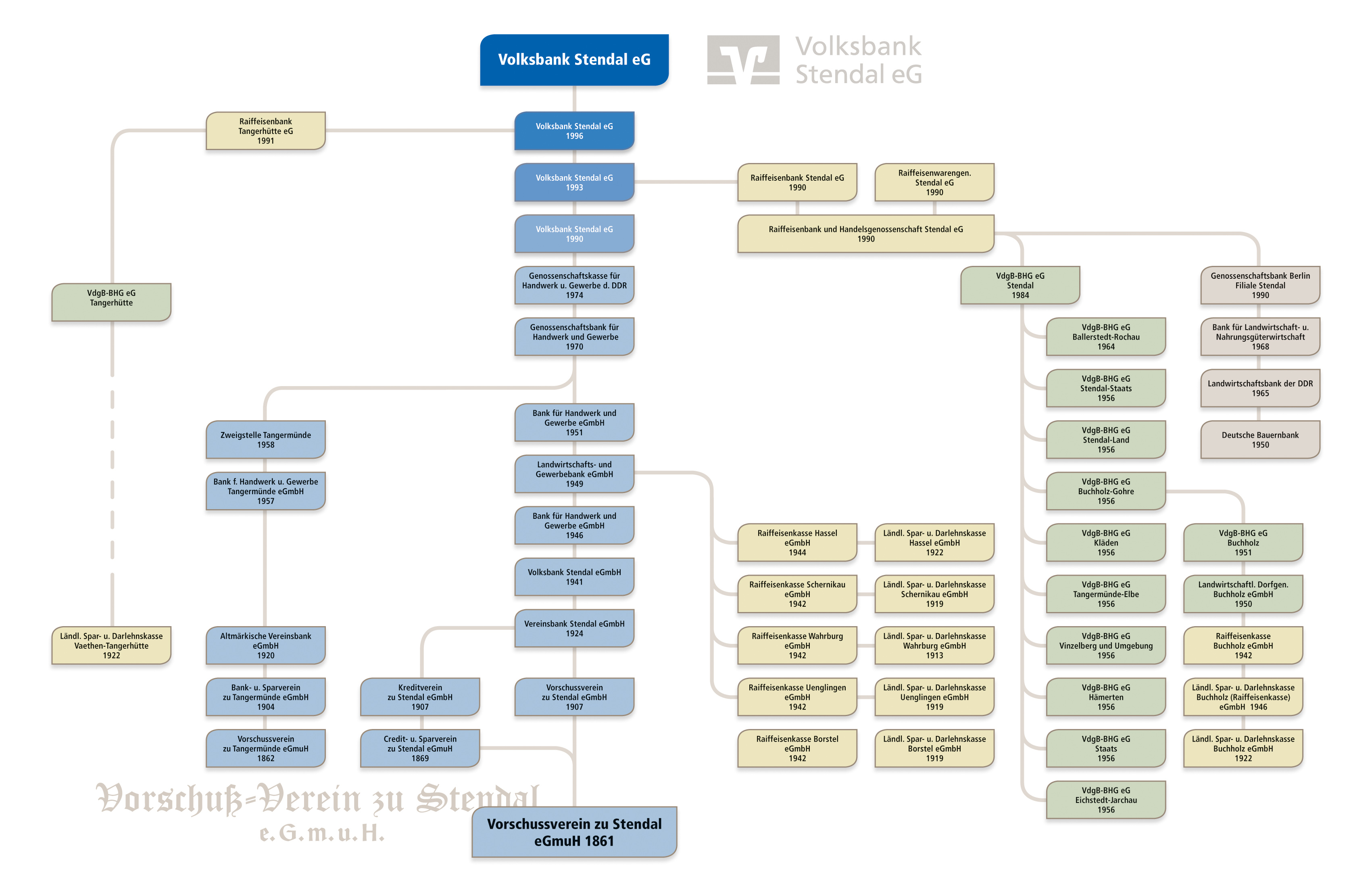 Stammbau der Volksbank Stendal eG